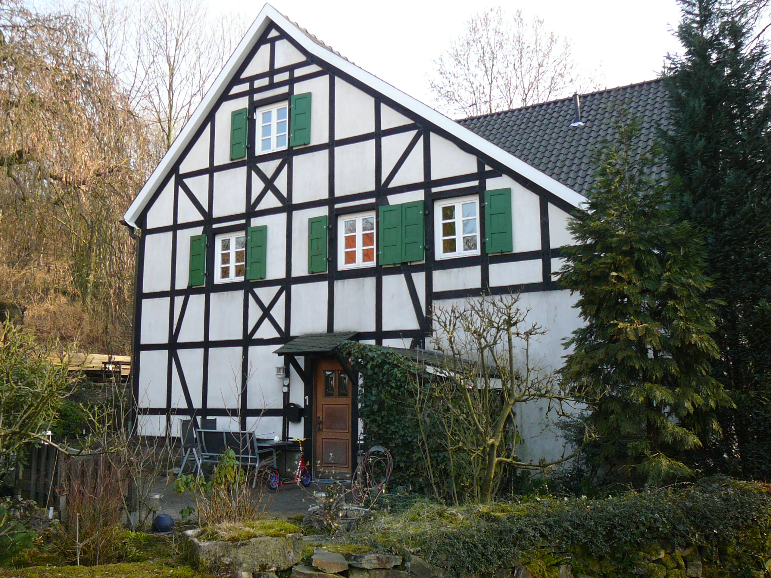 Bies, Wuppertal